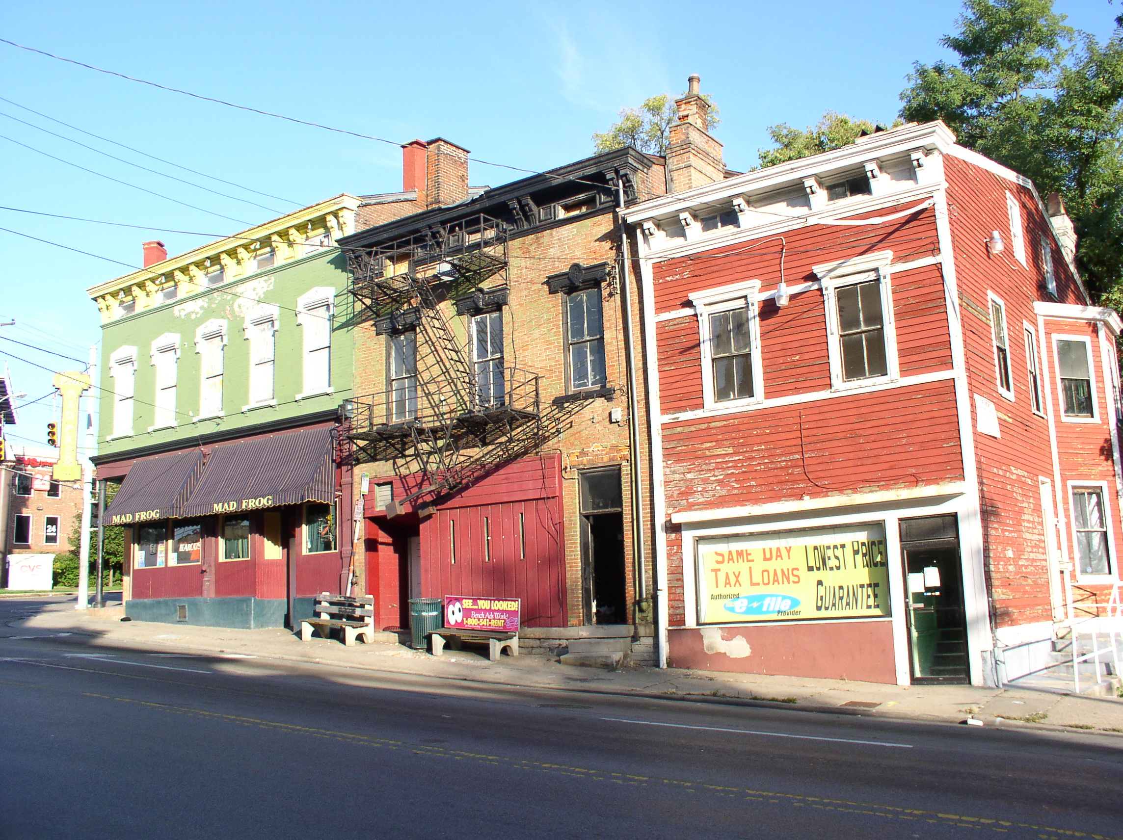 Vine St. in Cincinnati, OH